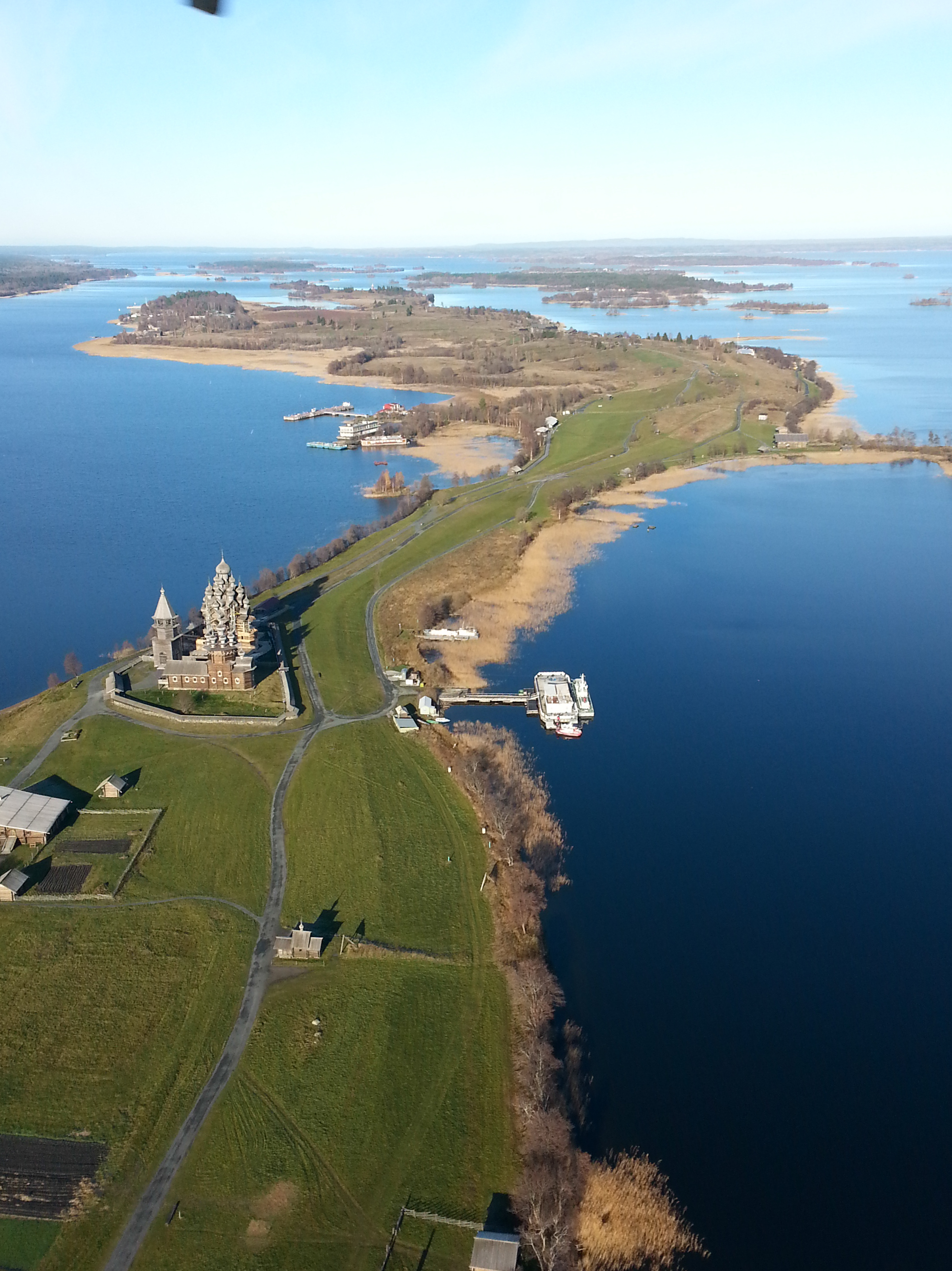 Охранная зона музея-заповедника "Кижи", Медвежьегорский район This image is related to the protected area of Russia number 1010088